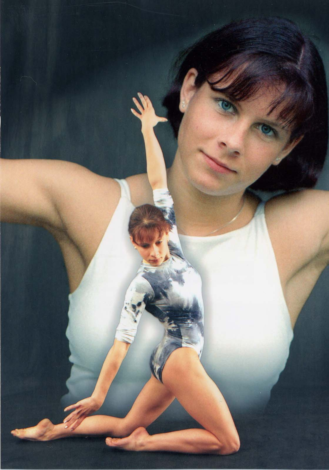 Turnerin Gritt Hofmann